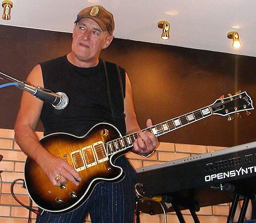 Jan Akkerman, a Dutch guitarist in Arkhangelsk, Russia.